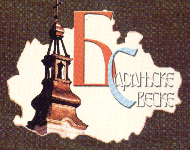 logo: Baranjske sveske iz Pečuja